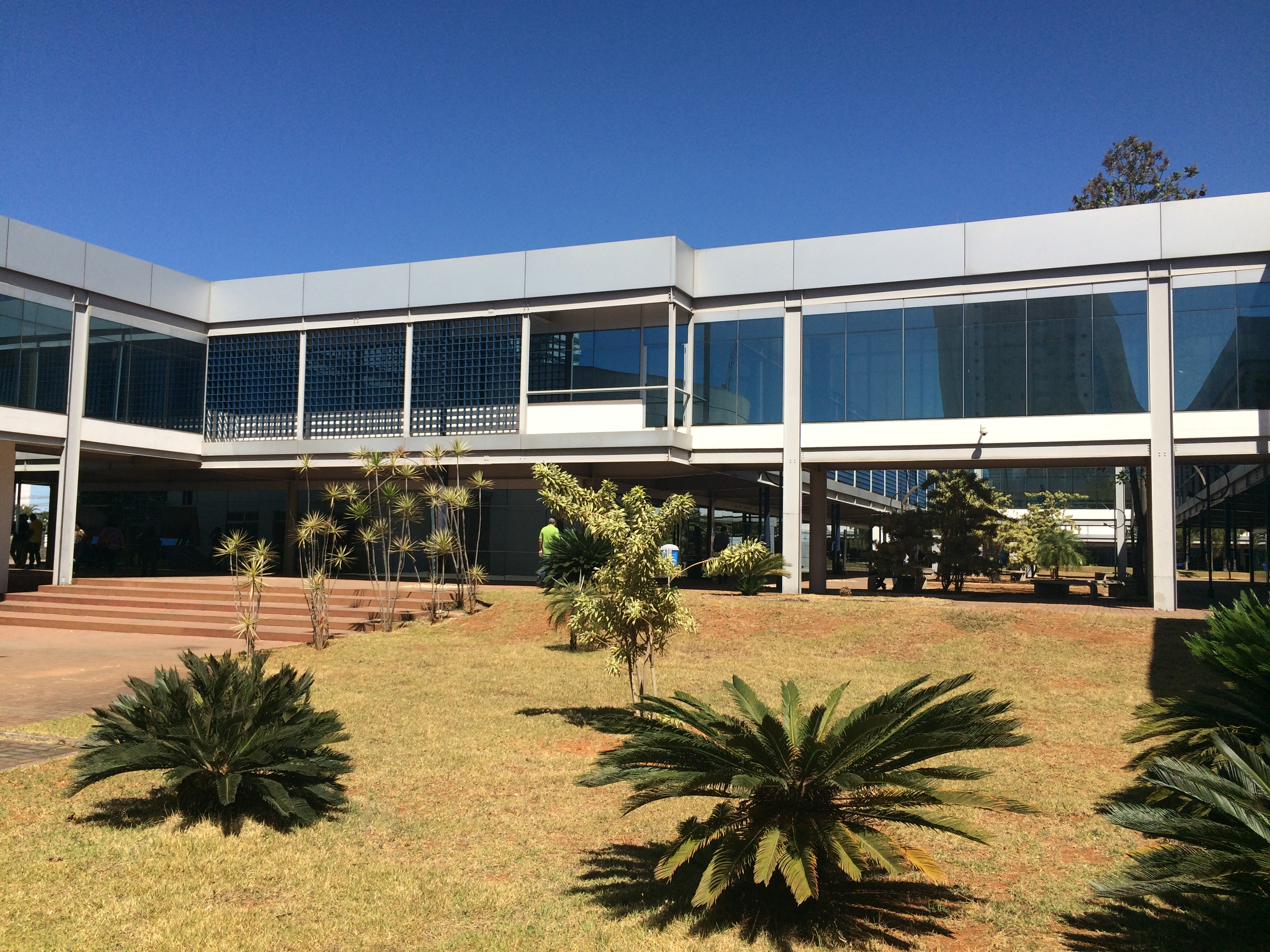 Pátio interno